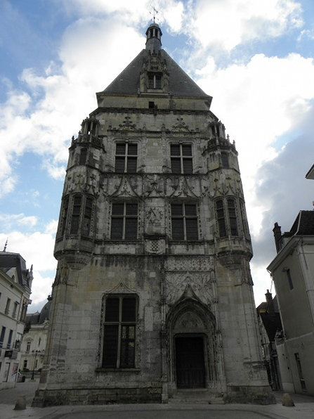 Beffroi de Dreux (28).